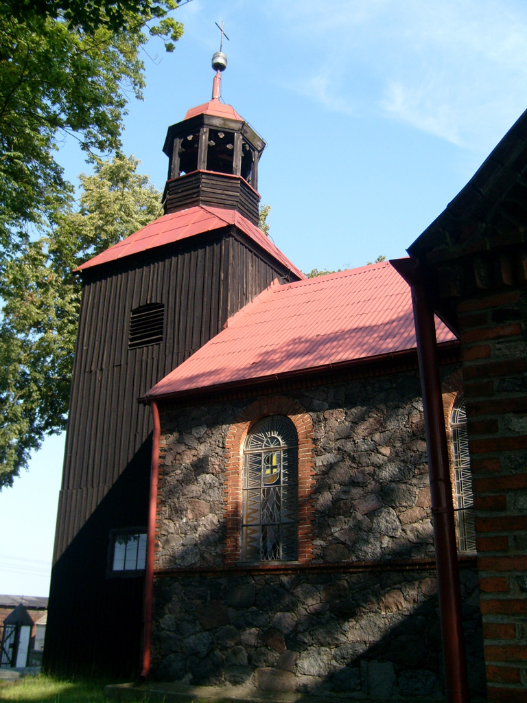 The church in Rzeczyca, Poland